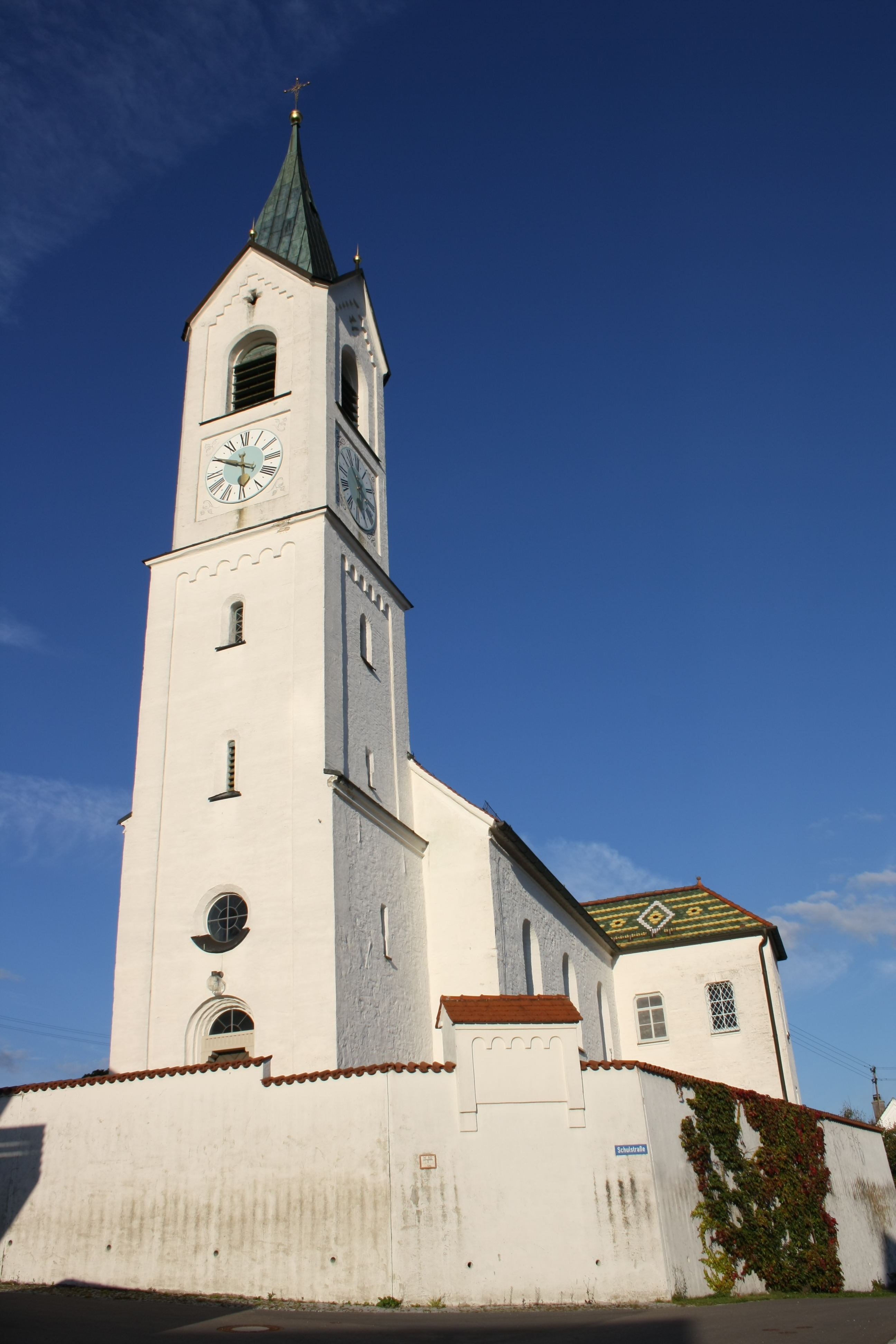 Katholische Pfarrkirche St. Vitus in Reistingen (Gemeinde Ziertheim), Turm aus der Mitte des 19. Jahrhunderts mit Spitzhelm über Dreiecksgiebeln